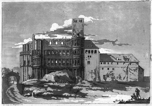 Die Porta Nigra in Trier ("Trierisches Alterthum"; Gest: & gez. von A. Ramboux 1814)